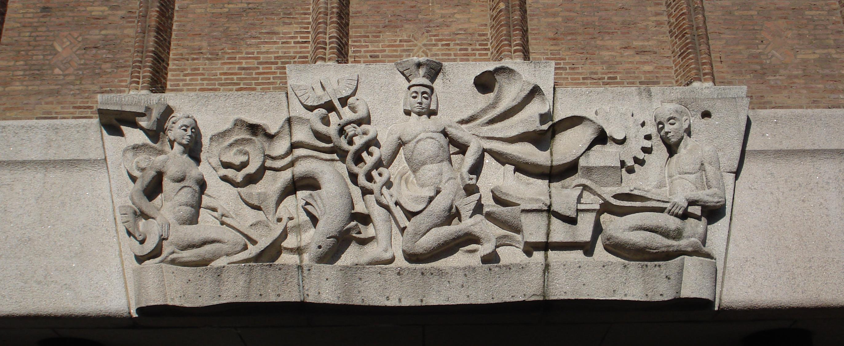 Rotterdam, Coolsingel. Detail ABN-AMRO bank. Rotterdam/The Netherlands.